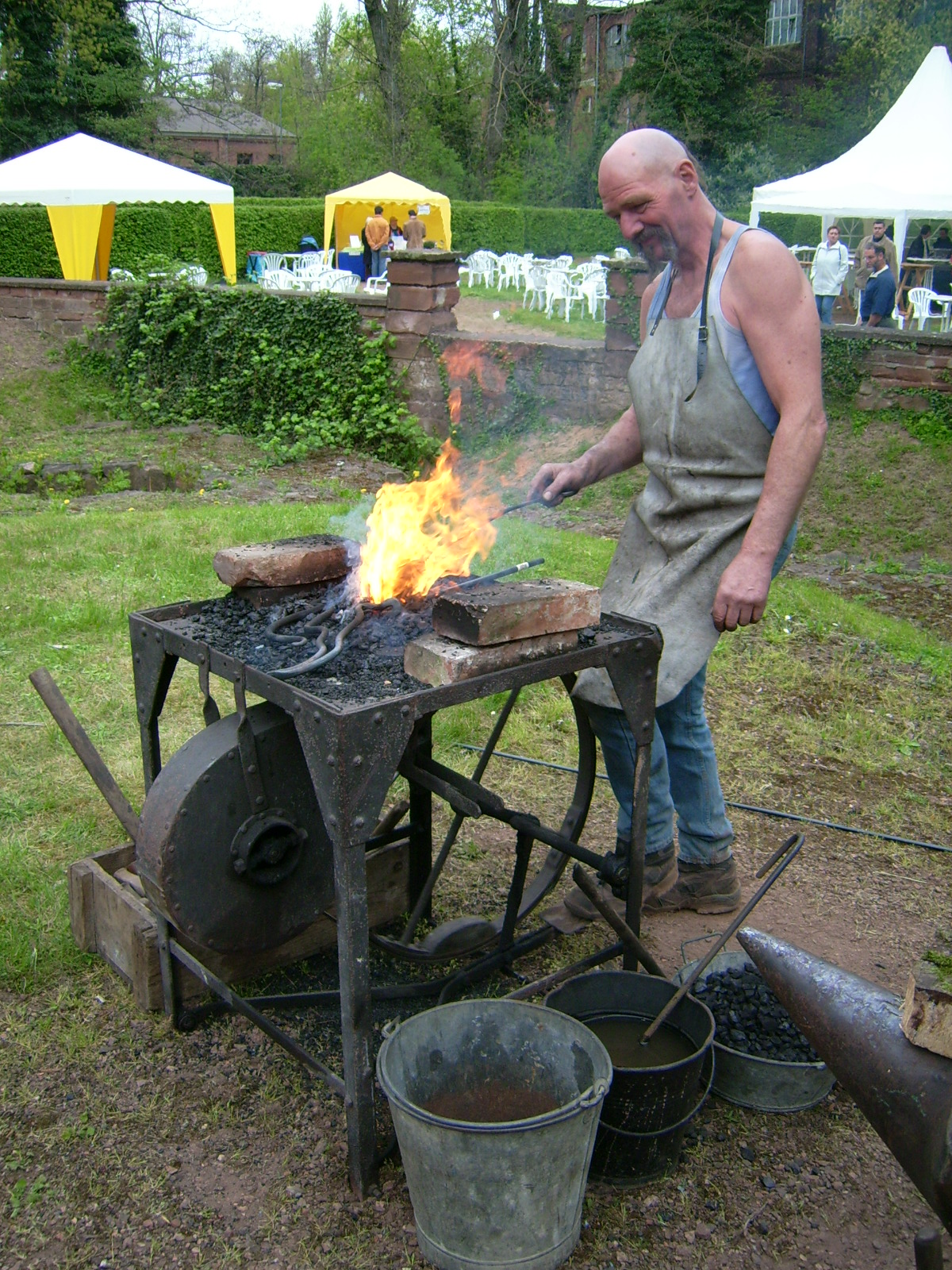 Feldschmiede auf dem Kunsthandwerkermarkt in Dillingen/Saar